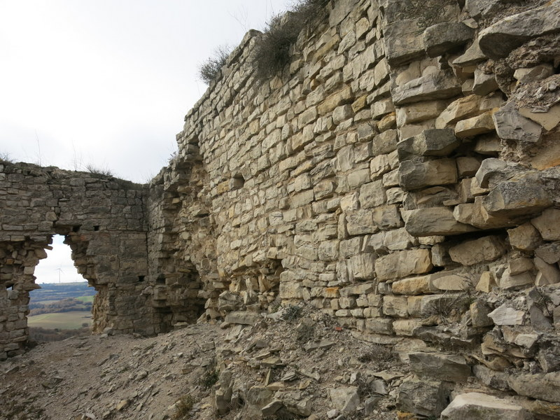 Castell de Mirambell, comarca Anoia, Catalunya